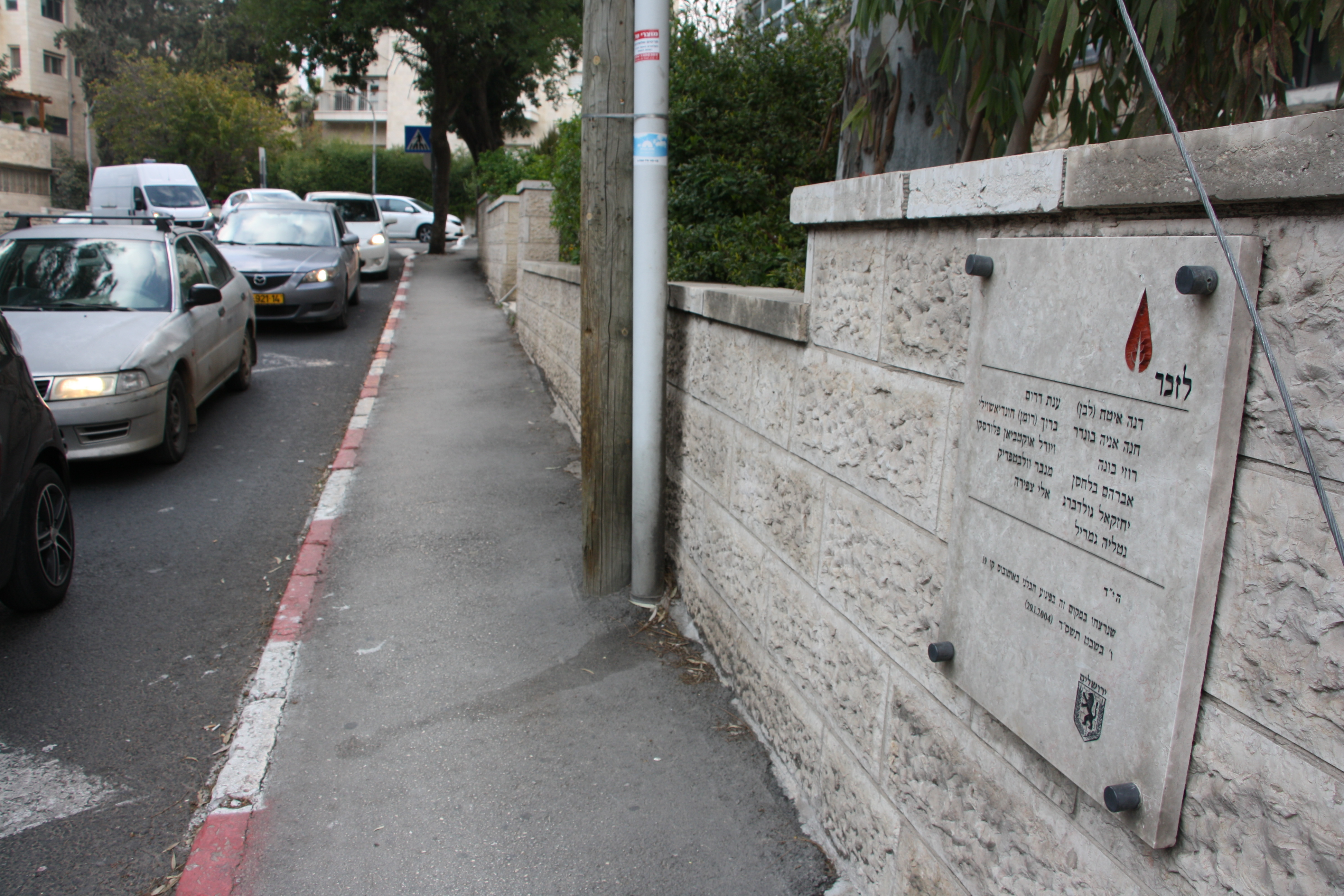 לוח זיכרון רחוב עזה ארלוזורוב ירושלים